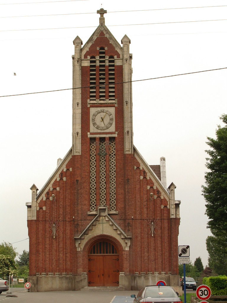 Eglise Saint Vaast Wingles